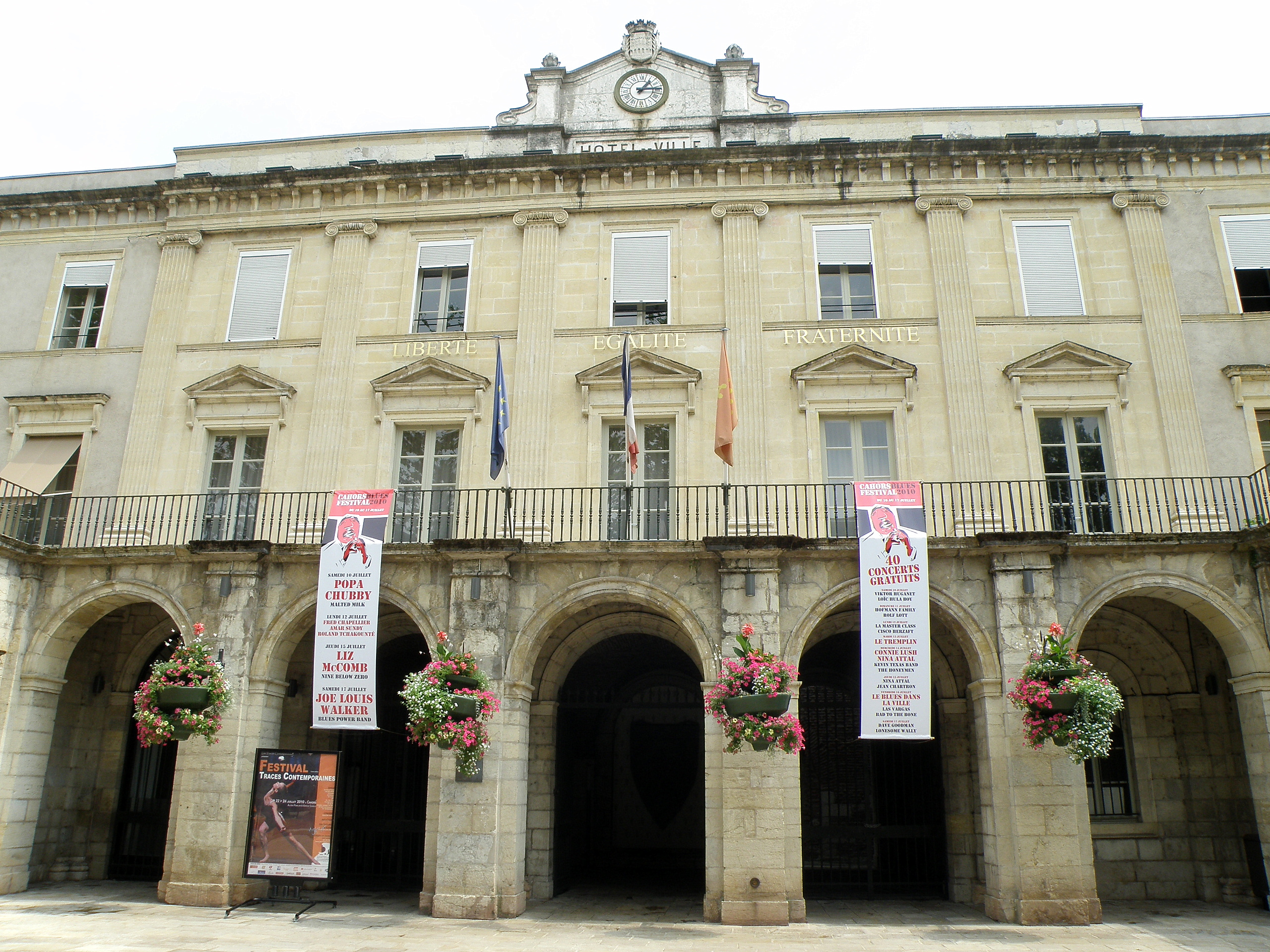 Cahors (Lot, France). Hôtel de ville (milieu XIXe, arch. Malo).